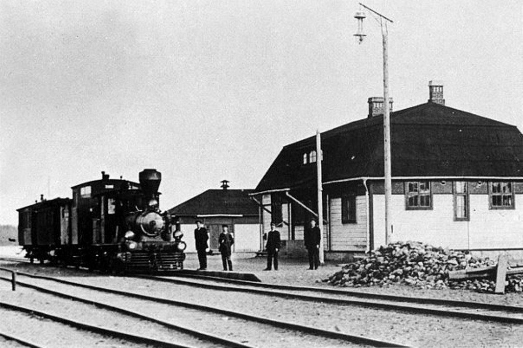 1920-e годы. Станция Лахденпохья